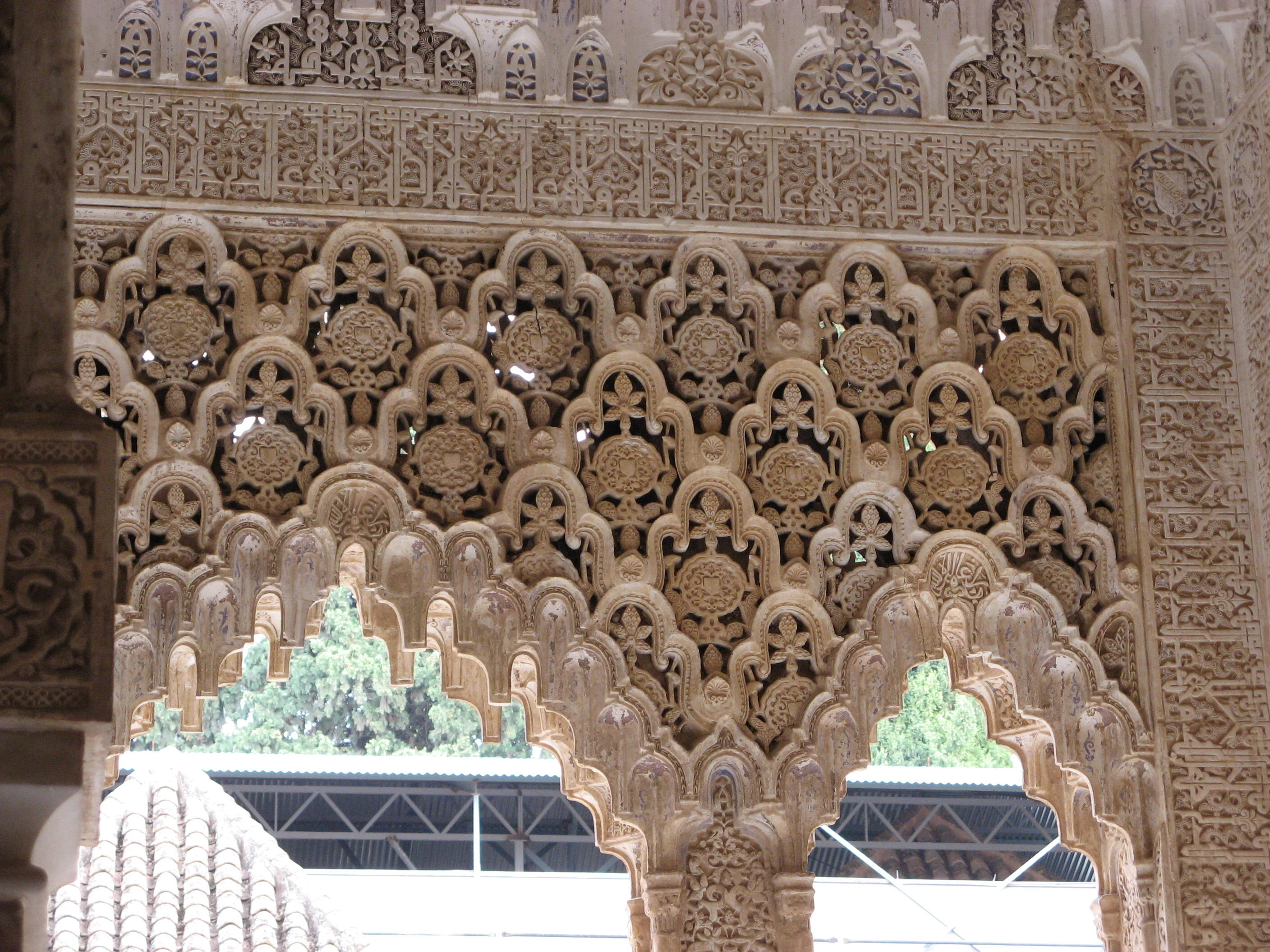 Alhambra in Granada, Spain - Detail